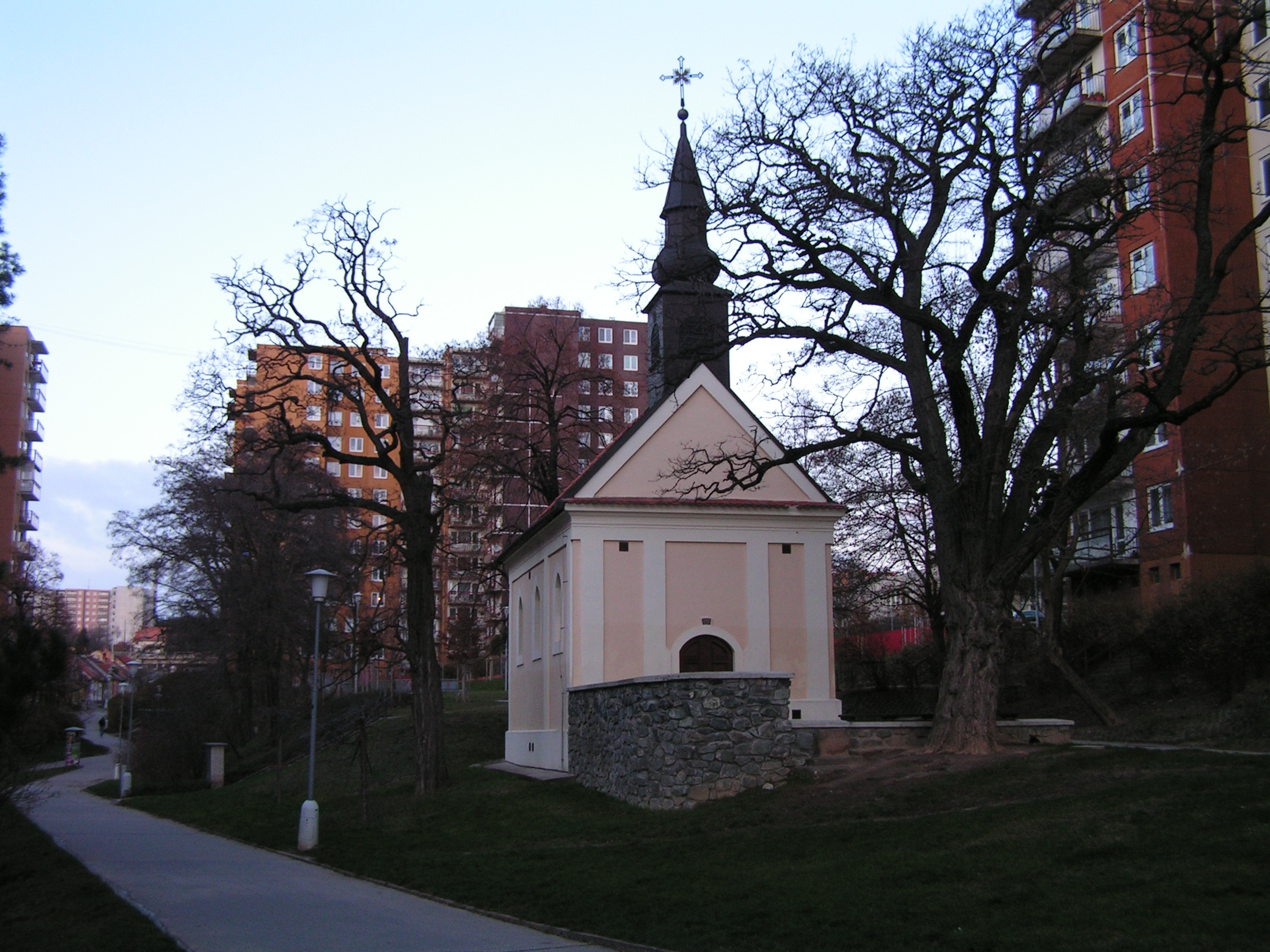 Kaple sv. Cyrila a Metoděje v Brně-Bohunicích